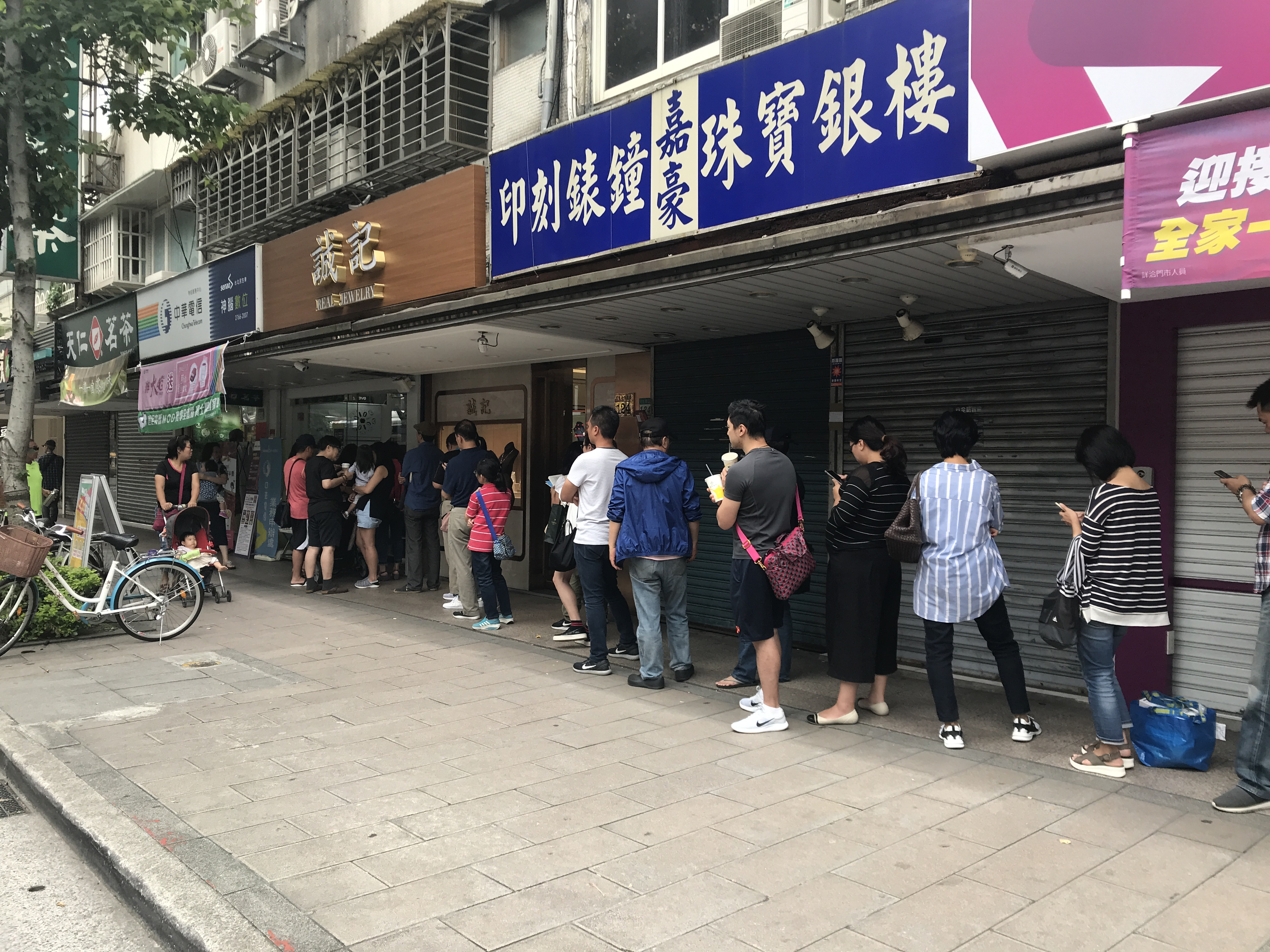 2018年5月母親節前夕，臺灣三大電信服務業者先後推出4G499元上網吃到飽限期超值優惠方案，引發民眾大規模解約、換約潮，尤以市占率最高的中華電信為最，被大眾媒體稱為499之亂。這是中華電信台北民生東特約服務中心（臺北市松山區民生東路五段124之2號）上午11時30分營業前，民眾排隊等待申辦4G499元上網吃到飽方案的長龍。